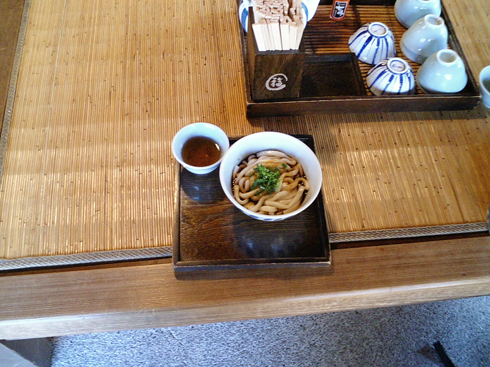 うどんやふくすけの伊勢うどん。2005年11月16日に三重県伊勢市で基建吉が撮影した。